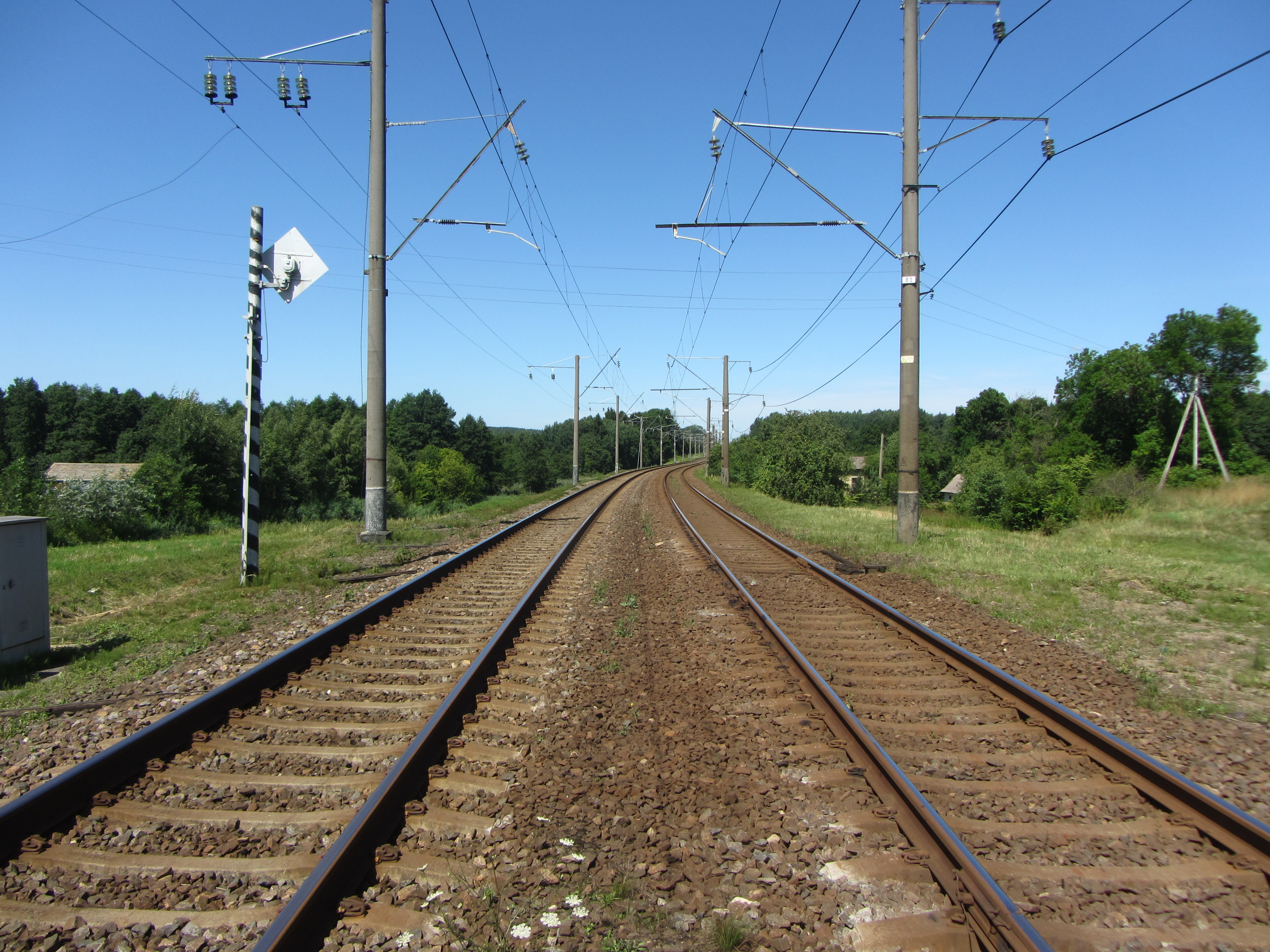 Zasliai, Lithuania